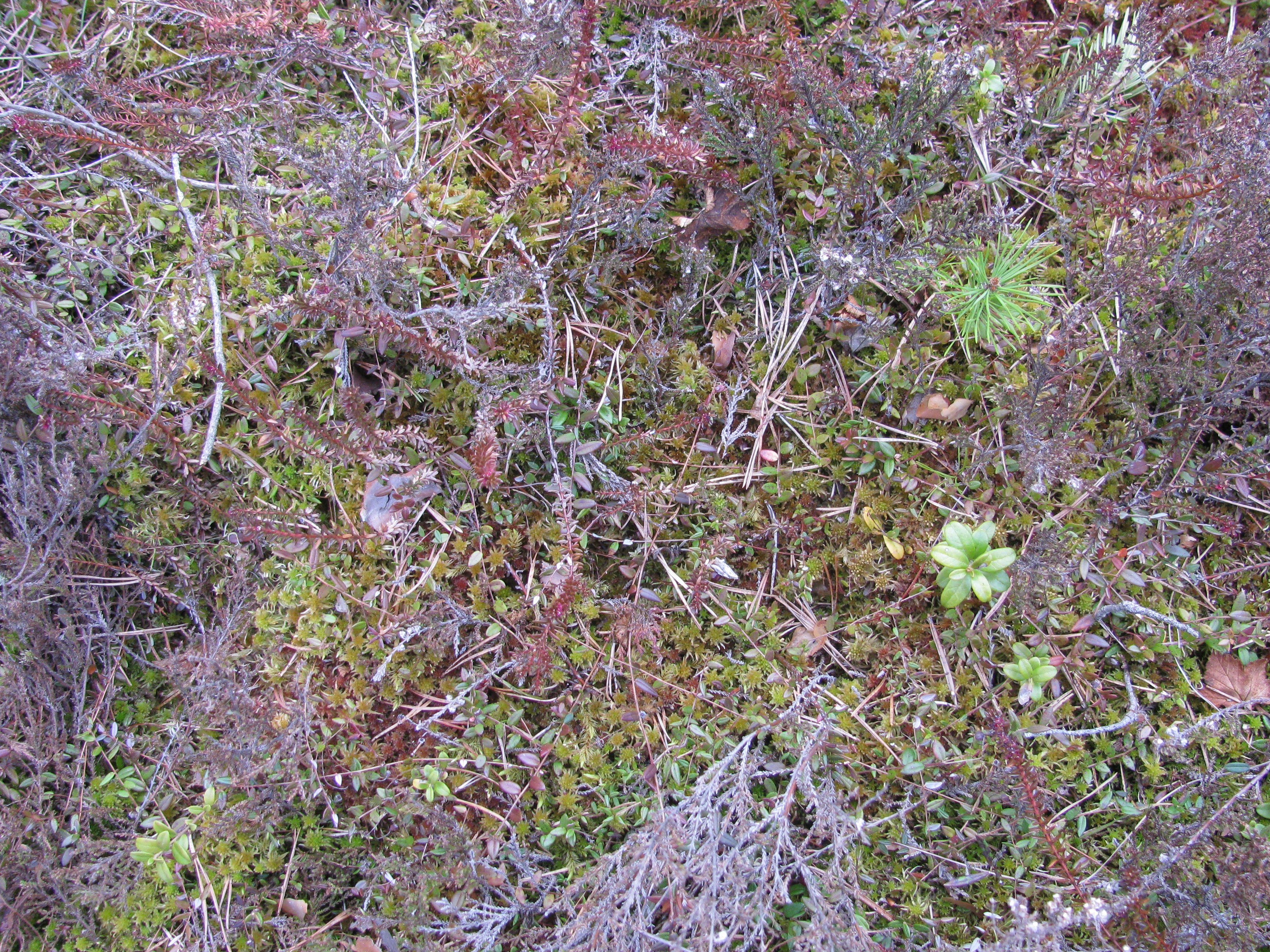 Taimestik Tõnumaa rabas